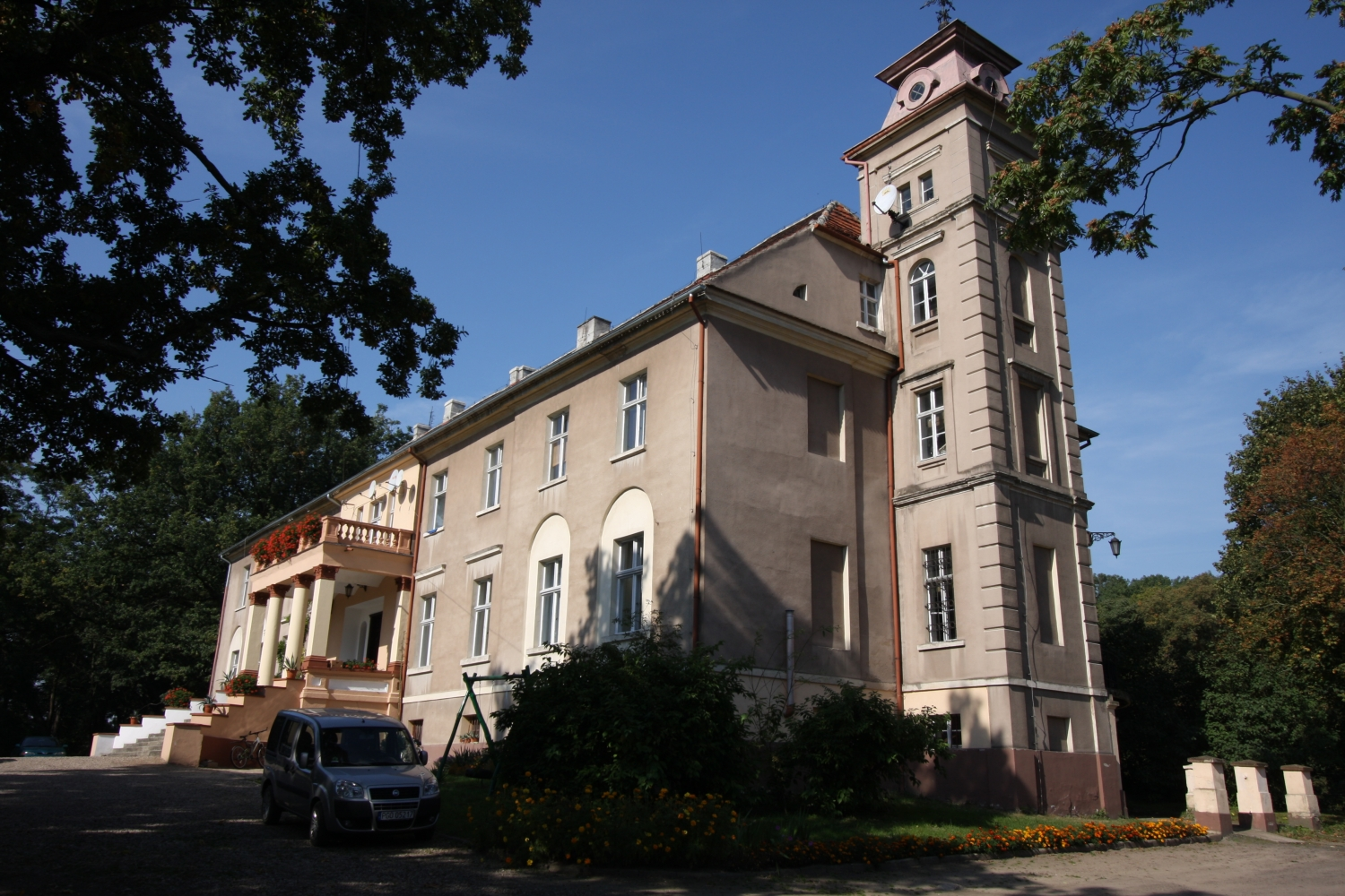 Wielichowo, pałac, mur., pocz. XIX, 1897